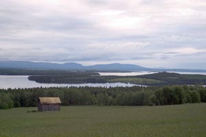 Få teaterföreställningar kan skryta med en scendekor som sträcker sig flera mil, och som tagit naturen många tusen år att formge.